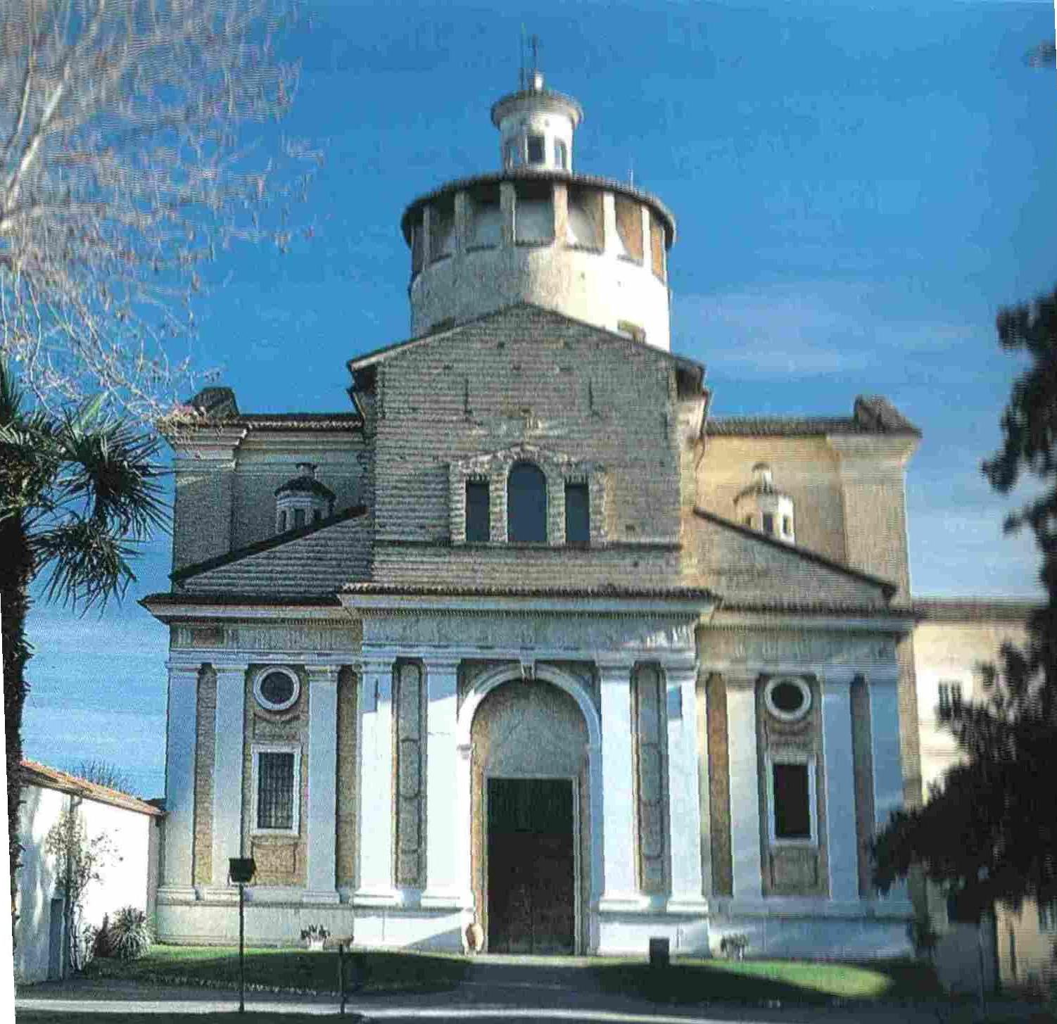 La chiesa della Certosa di San Girolamo, detta Certosa di Parma.